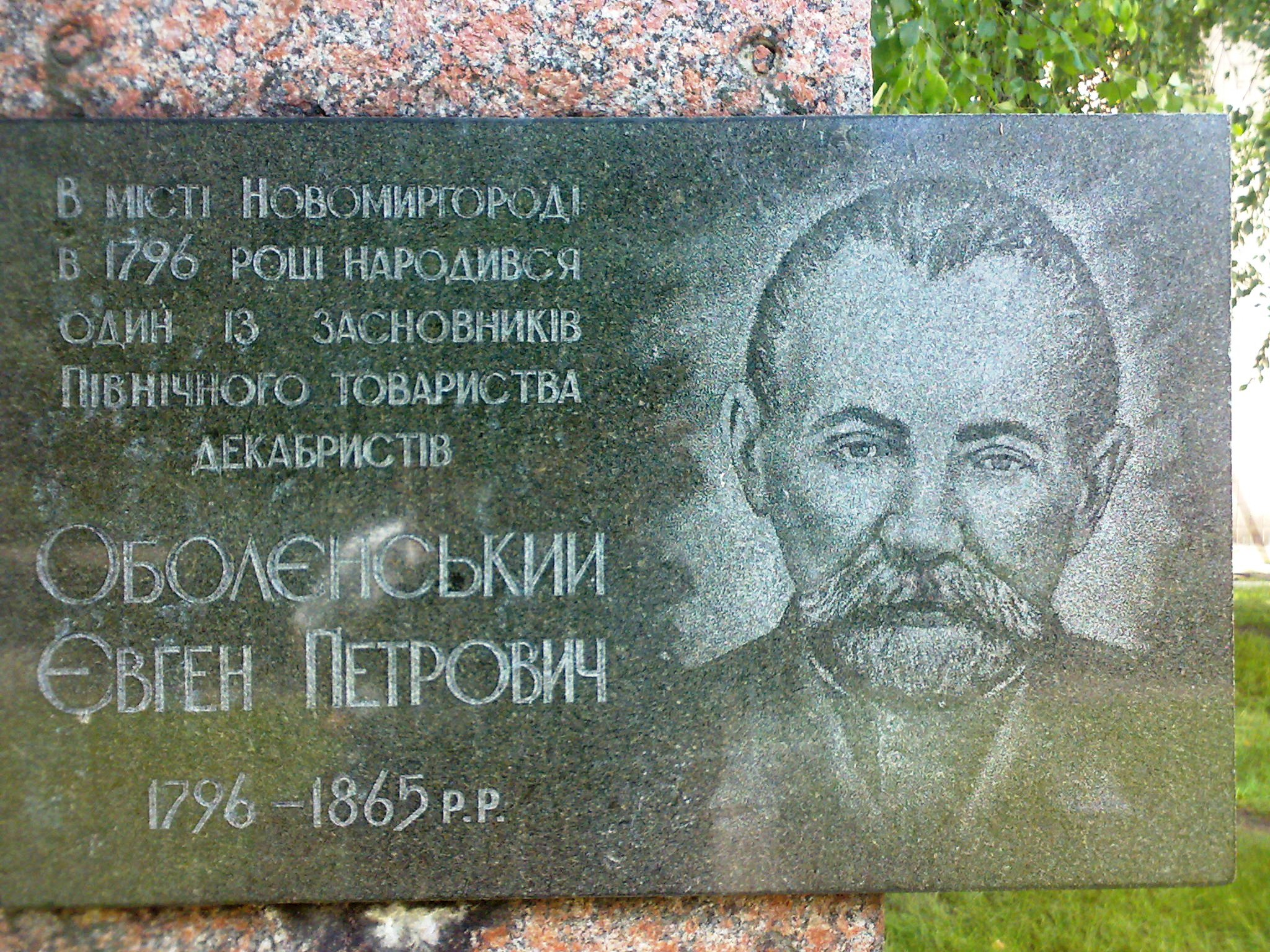 Меморіальна дошка Є. П. Оболенському (Новомиргород, Кіровоградська область)